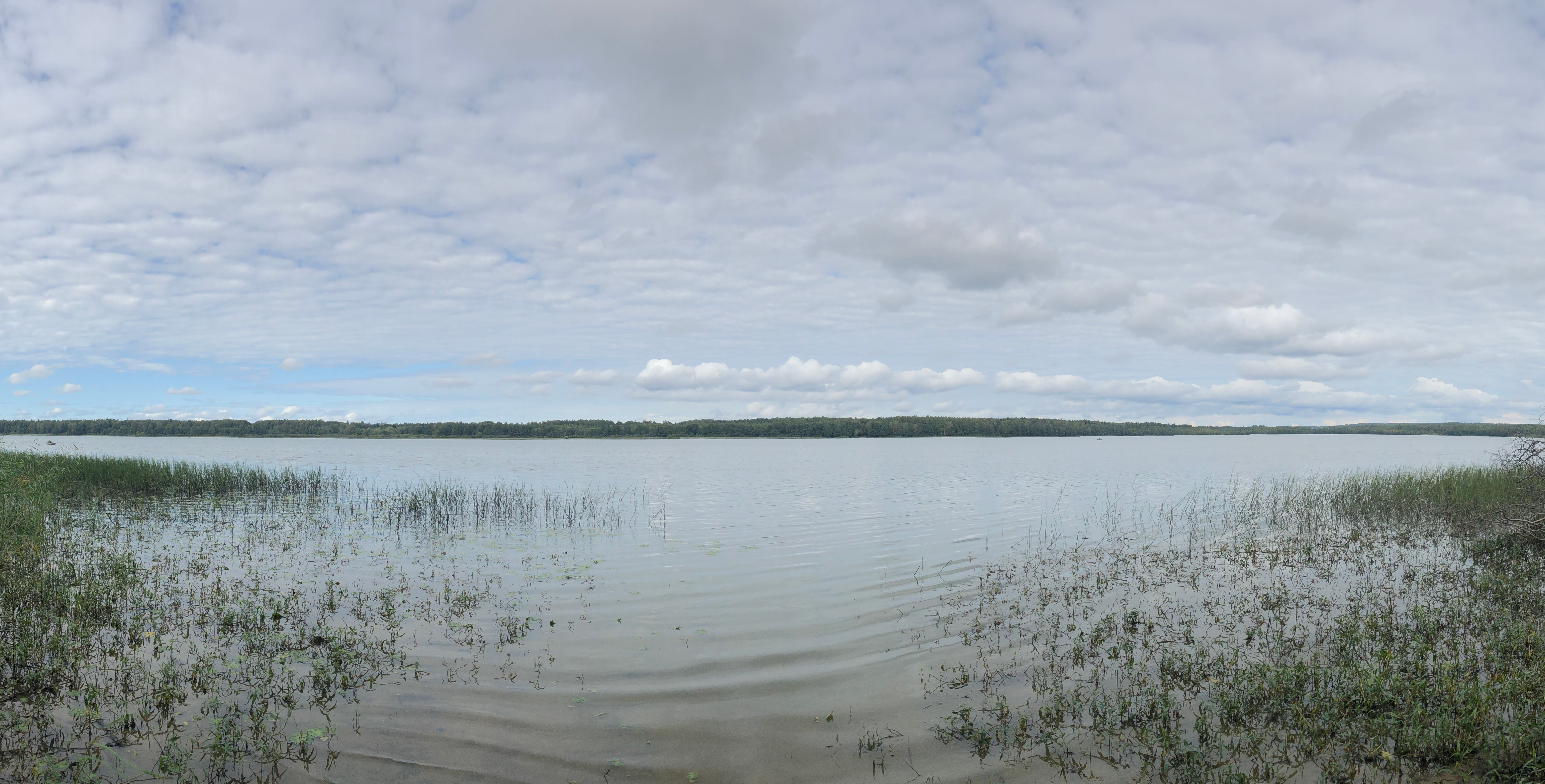 Бабинское озеро